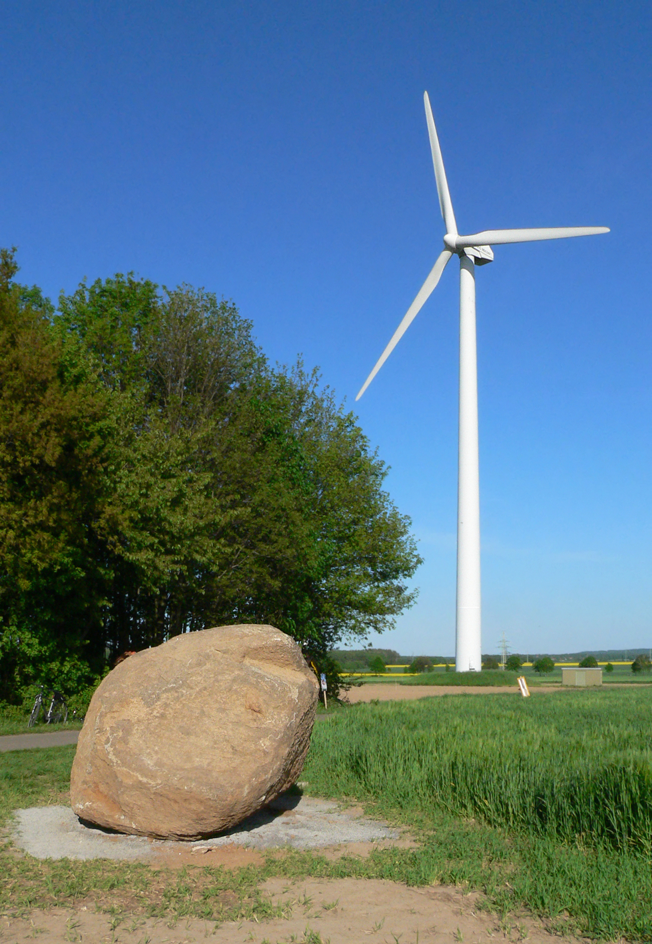 Findling von Ostermunzel nach der Aufstellung als Naturdenkmal auf dem Mühlenberg bei Ostermunzel